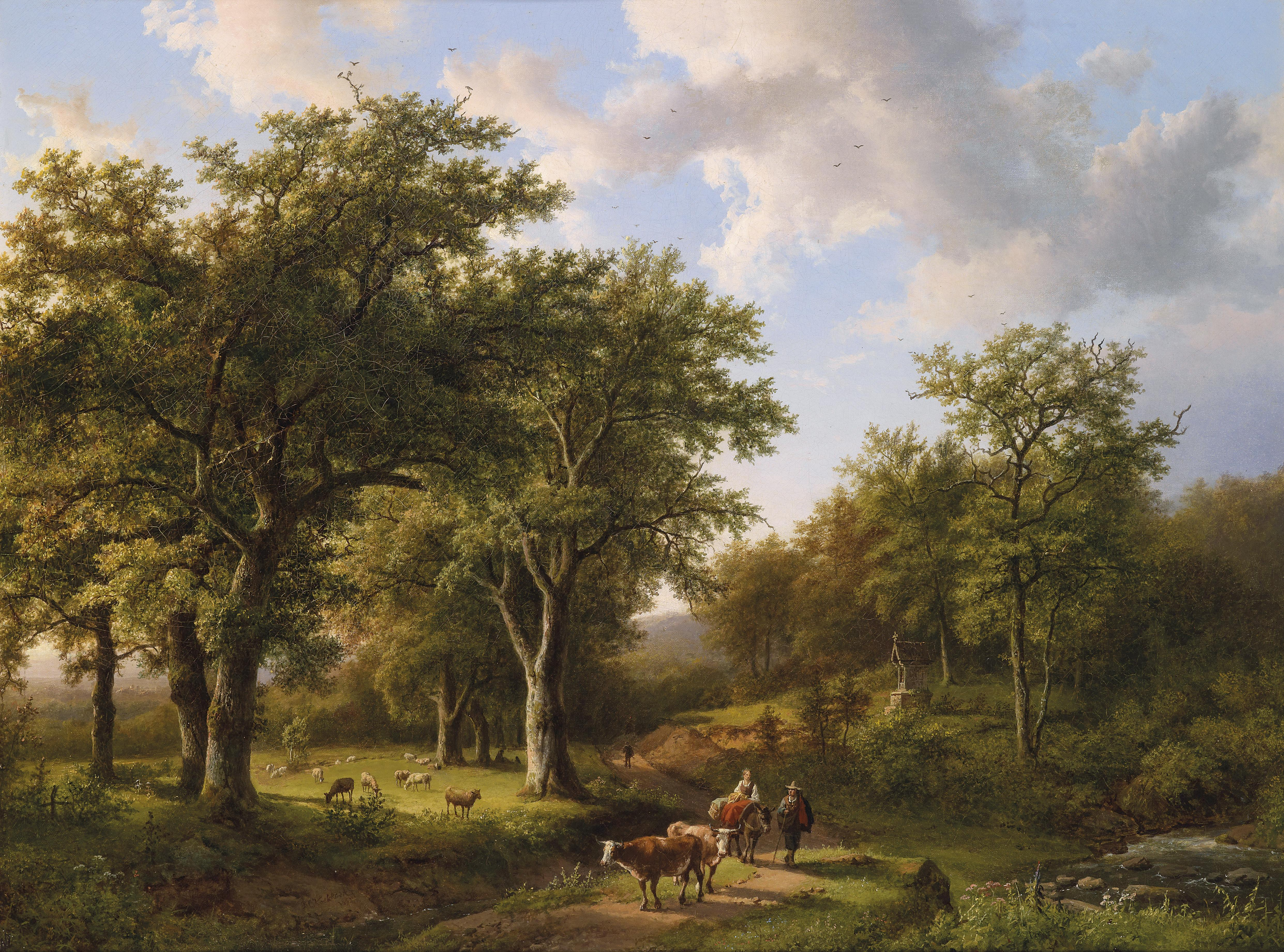 Waldlandschaft mit Hirten und Vieh, signiert, datiert B. C. Koekkoek ft./1857, rückseitig eine handschriftliche Echtheitsbestätigung des Künstlers, Öl auf Leinwand, 69x 92 cm